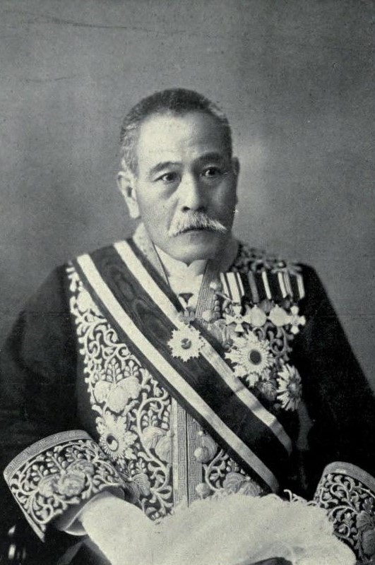 小松原英太郎